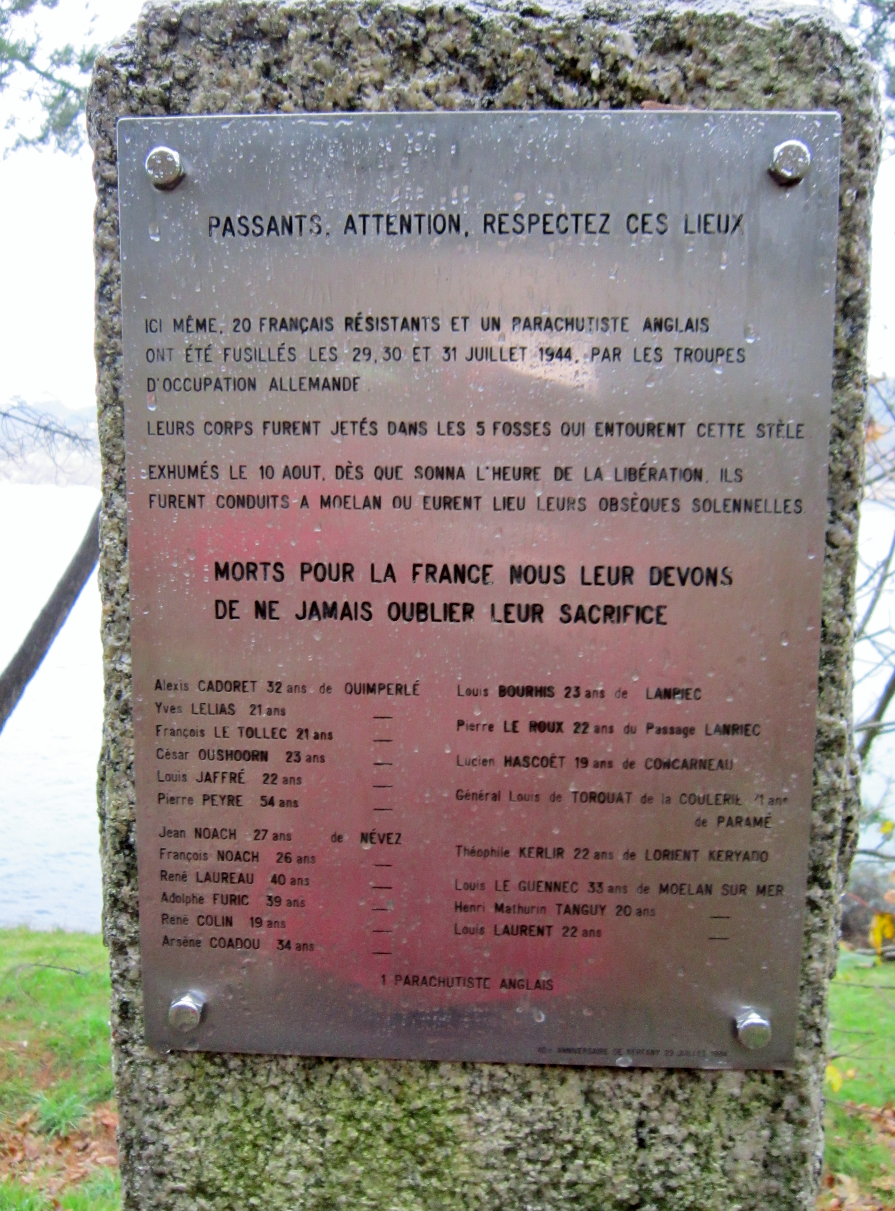 Panneau commémoratif des résistants fusillés à Kerfany les 29, 30 et 31 juillet 1944.